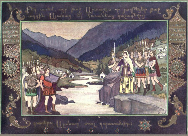 Аланская принцесса Сатеник просит армянского царя Арташеса отпустить пленного аланского принца.